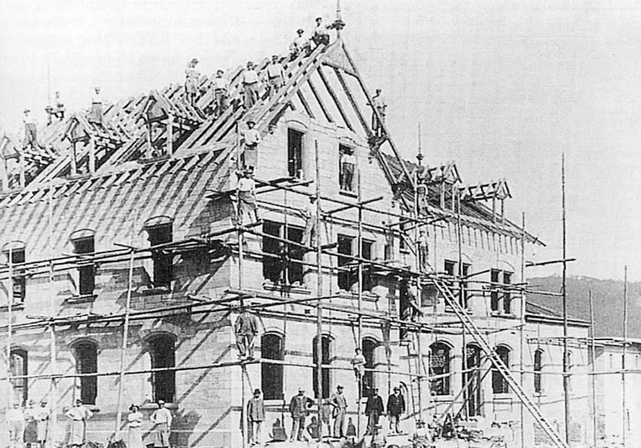 Bahnhof Lauterecken-Grumbach im Bau, ca. 1900